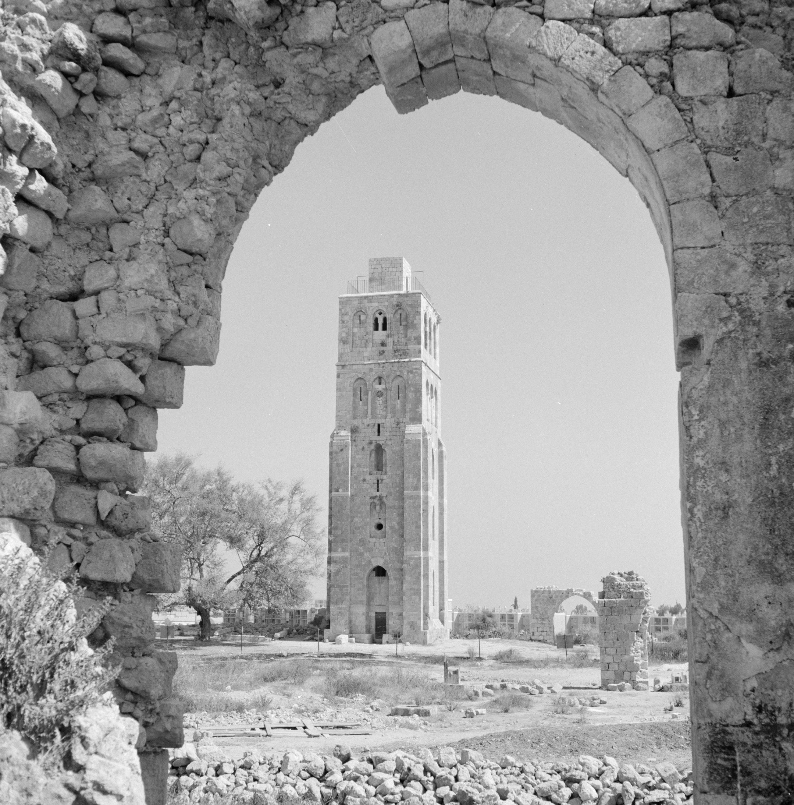 Collectie / Archief : Fotocollectie Van de Poll Reportage / Serie : [ onbekend ] Beschrijving : Ramle. Ruines van de Witte Moskee met zicht op de Witte Toren die gotische kenmerken vertoont Datum : 1 januari 1963 Locatie : Israël, Ramla Trefwoorden : architectuur, gotiek, islam, minaretten, moskeeën, muren, ruines, torens Fotograaf : Poll, Willem van de, [onbekend] Auteursrechthebbende : Nationaal Archief Materiaalsoort : Negatief (zwart/wit) Nummer archiefinventaris : bekijk toegang 2.24.14.02 Bestanddeelnummer : 255-3857